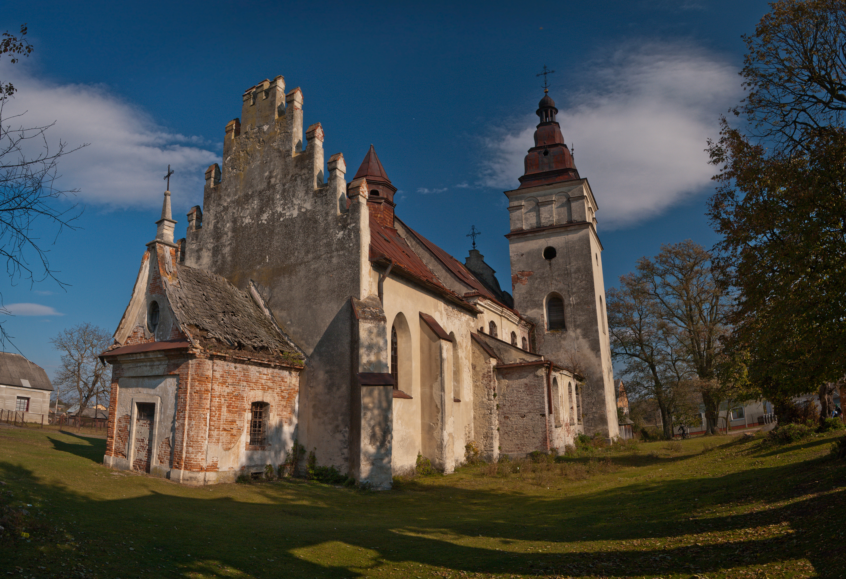 Костел Св. Миколи (1400-1651 рр.) в селі Вижняни